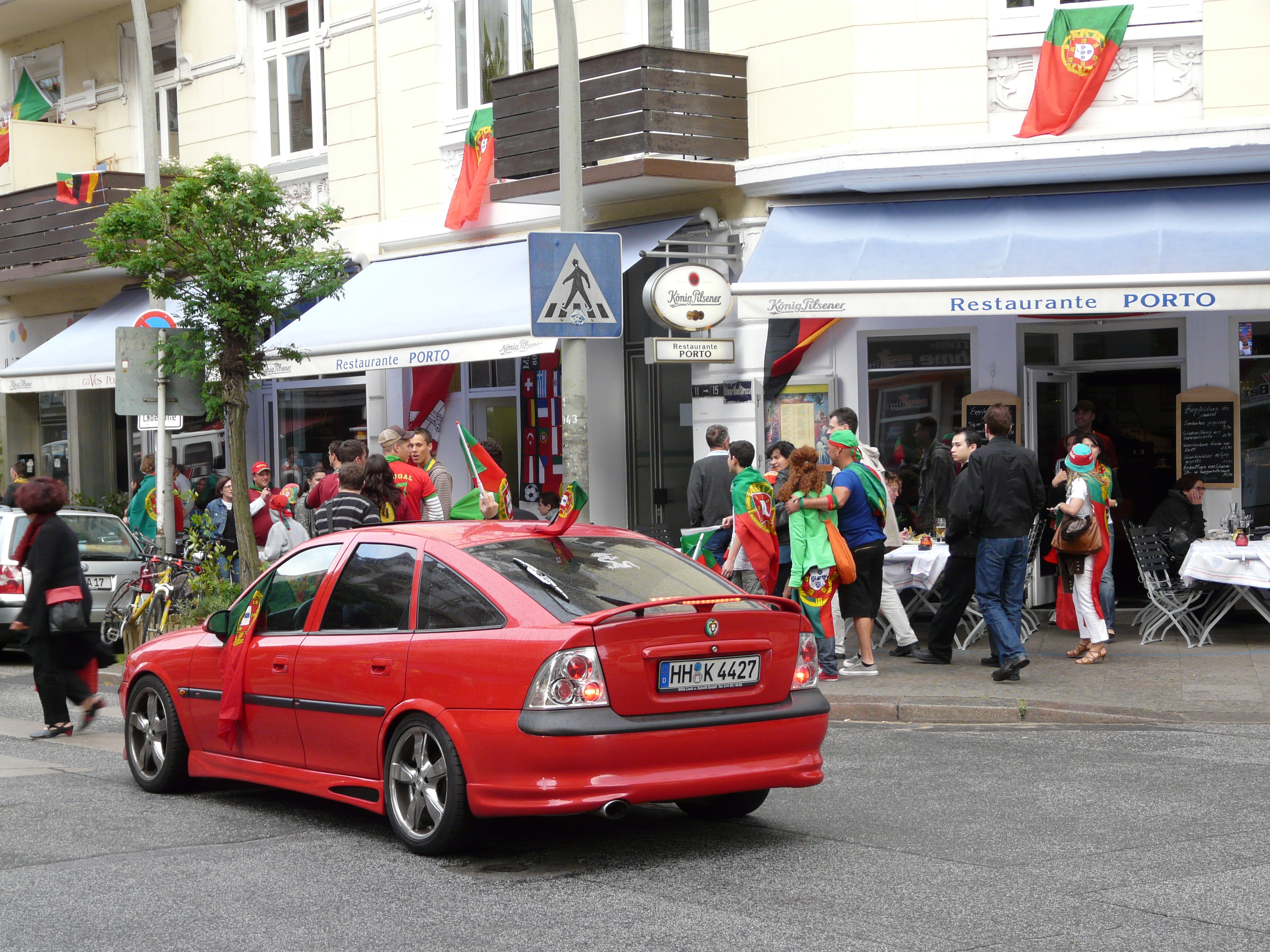 Strassenszenarie im Portugiesenviertel während der EM 2008